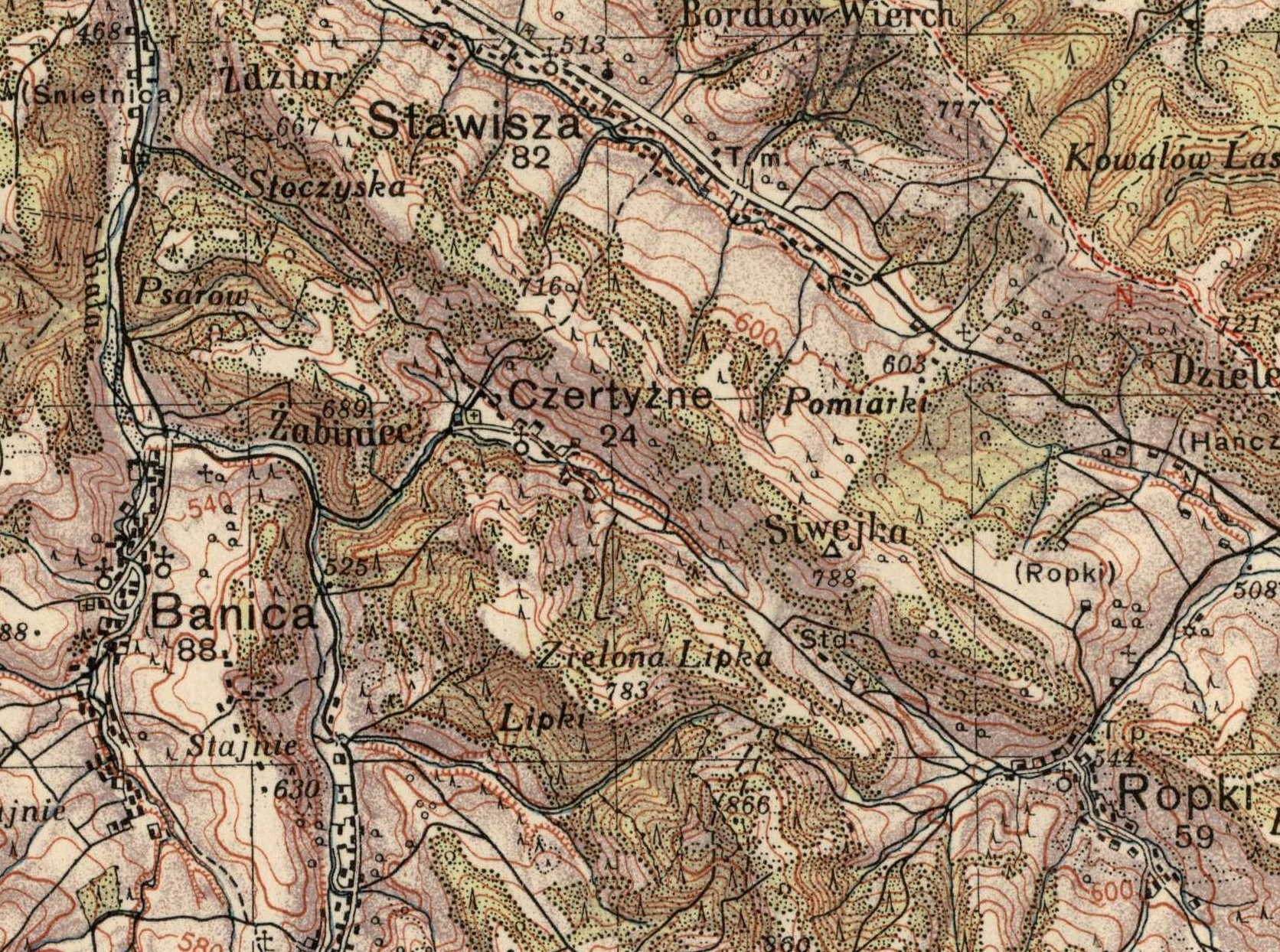 Wieś Czertyżne na mapie WIG z 1936 roku